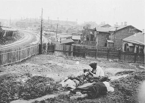 Фото часів Голодомору 1932-1933 рр